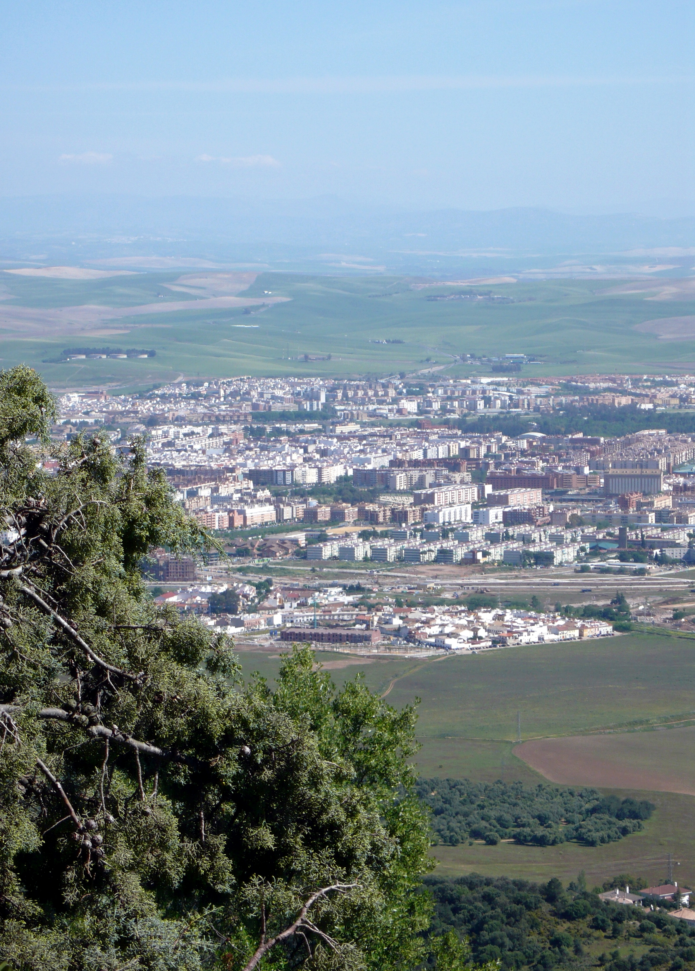 Vue de Cordoue, Andalousie - Espagne